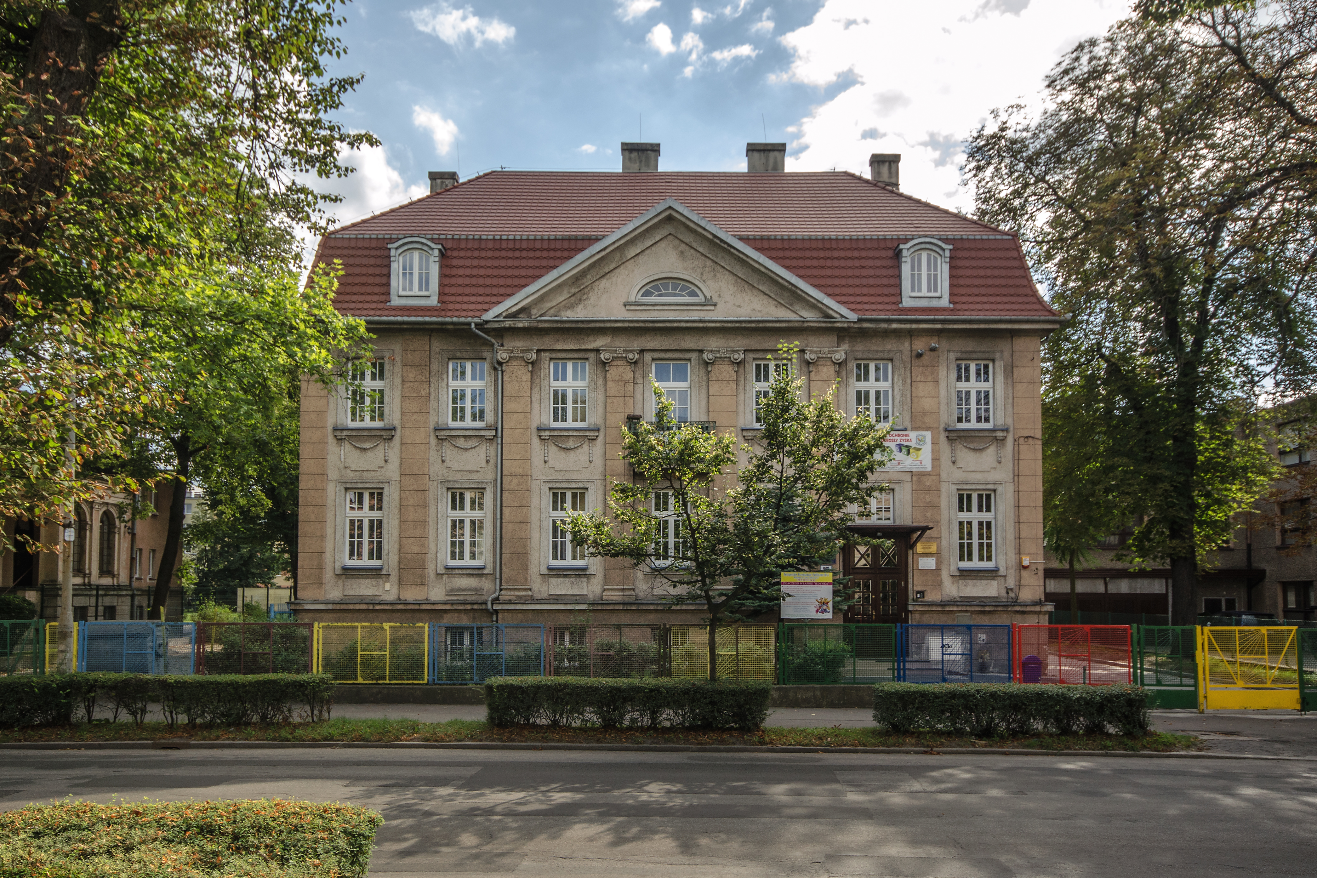 Brzeg, dom, 1870, 1910